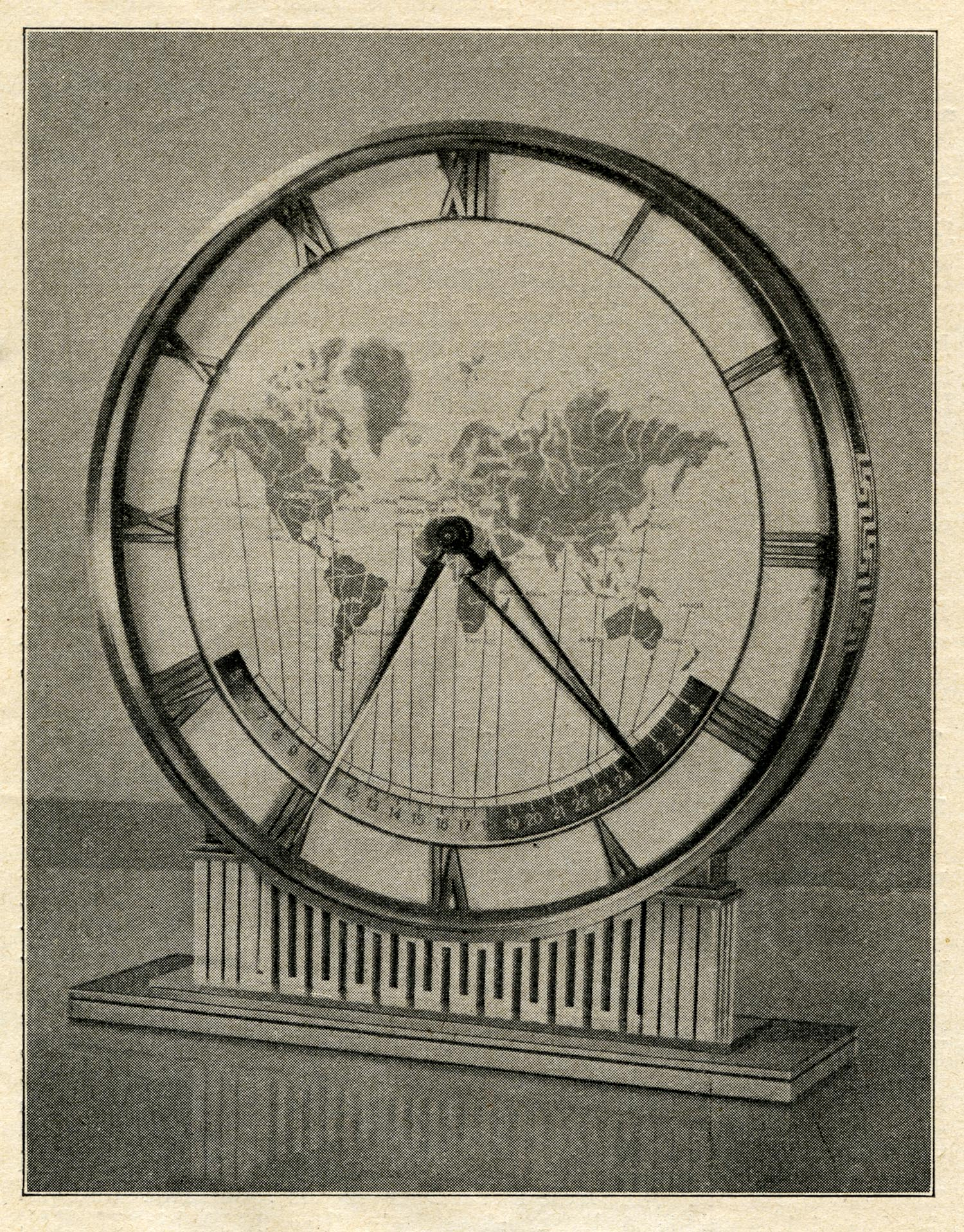 Weltzeituhr mit Hakenkreuzornamenten auf der Schmalseite, Geschenk des Gaues Württemberg-Hohenzollern an Adolf Hitler zum 50. Geburtstag, Entwurf: Heinrich Möller für Kienzle, Schwenningen 1939 (Deutsche Uhrmacherzeitung 1939, S. 255).